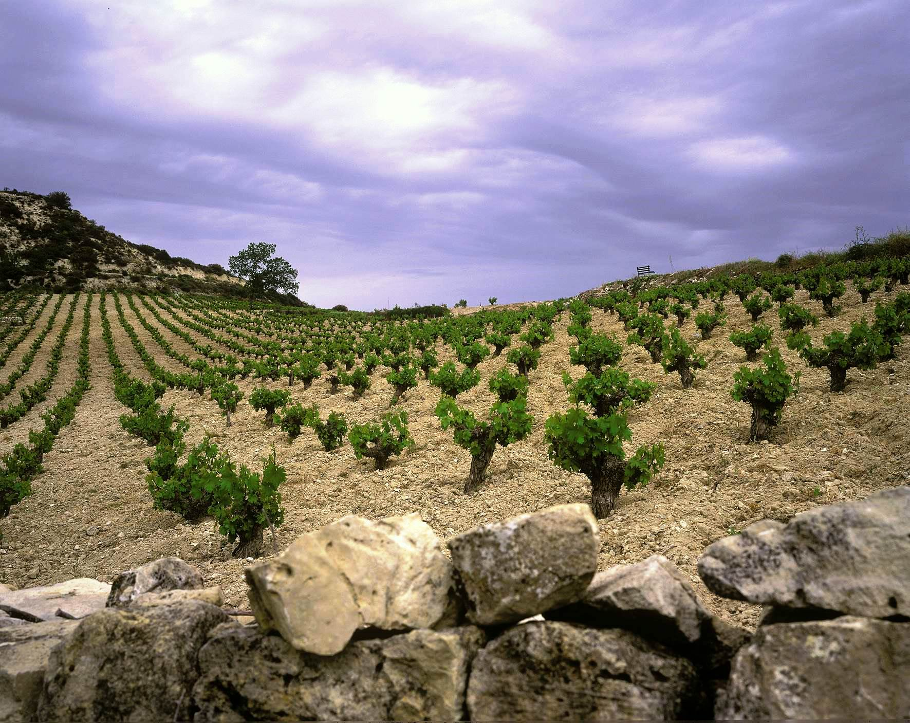 Vignes à Chypre au début juillet